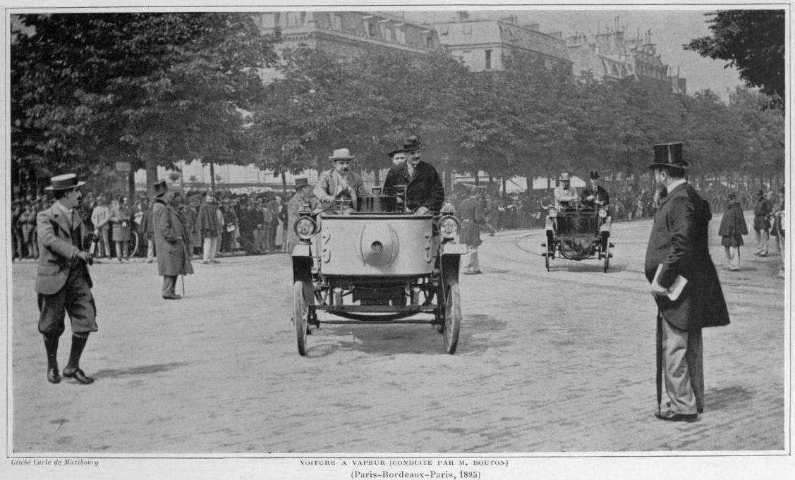 Voiture à vapeur du Comte de Dion, au départ de Paris-Bordeaux-Paris 1895.